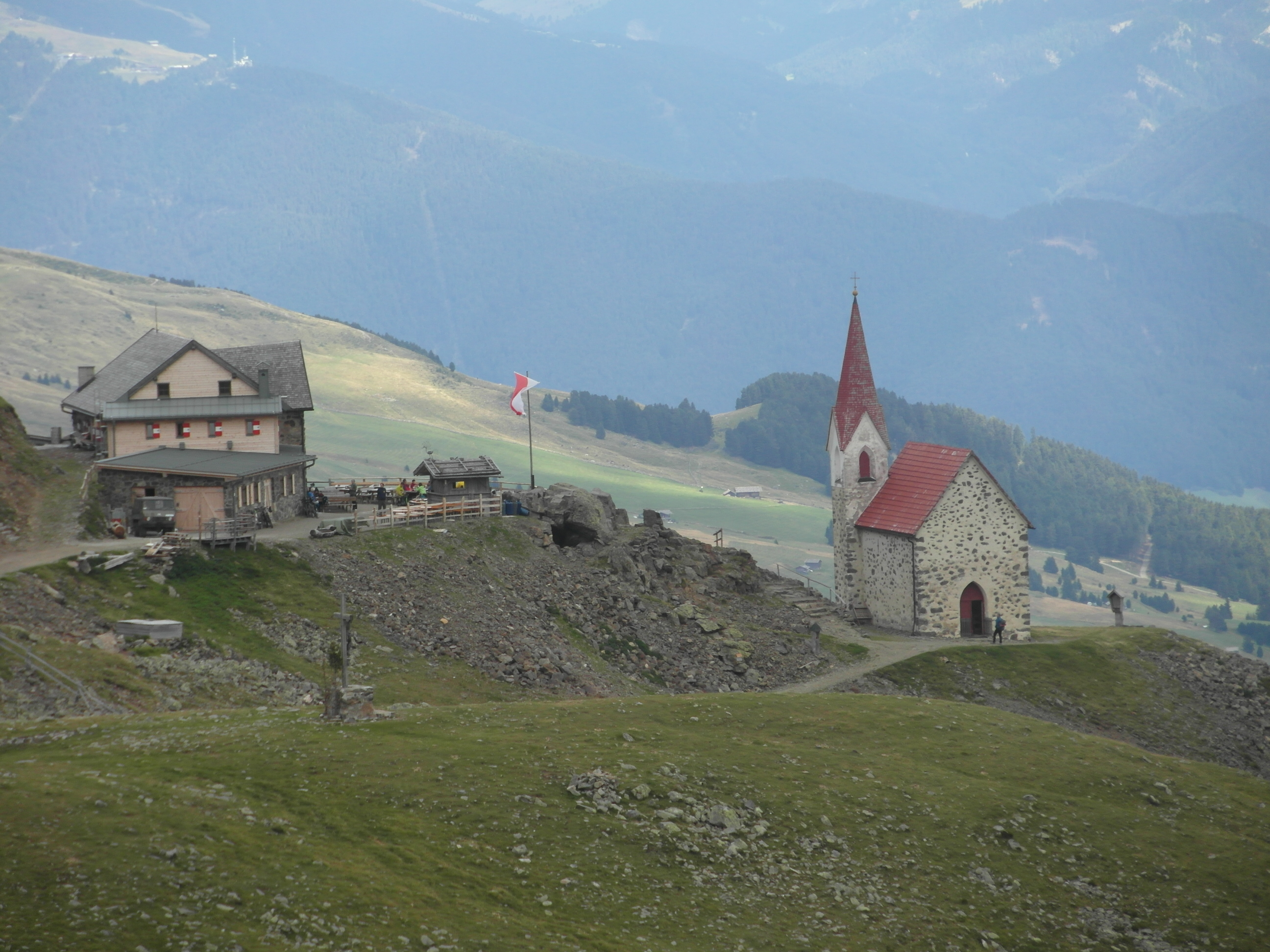 Rifugio e chiesa Santa Croce di Lazfons